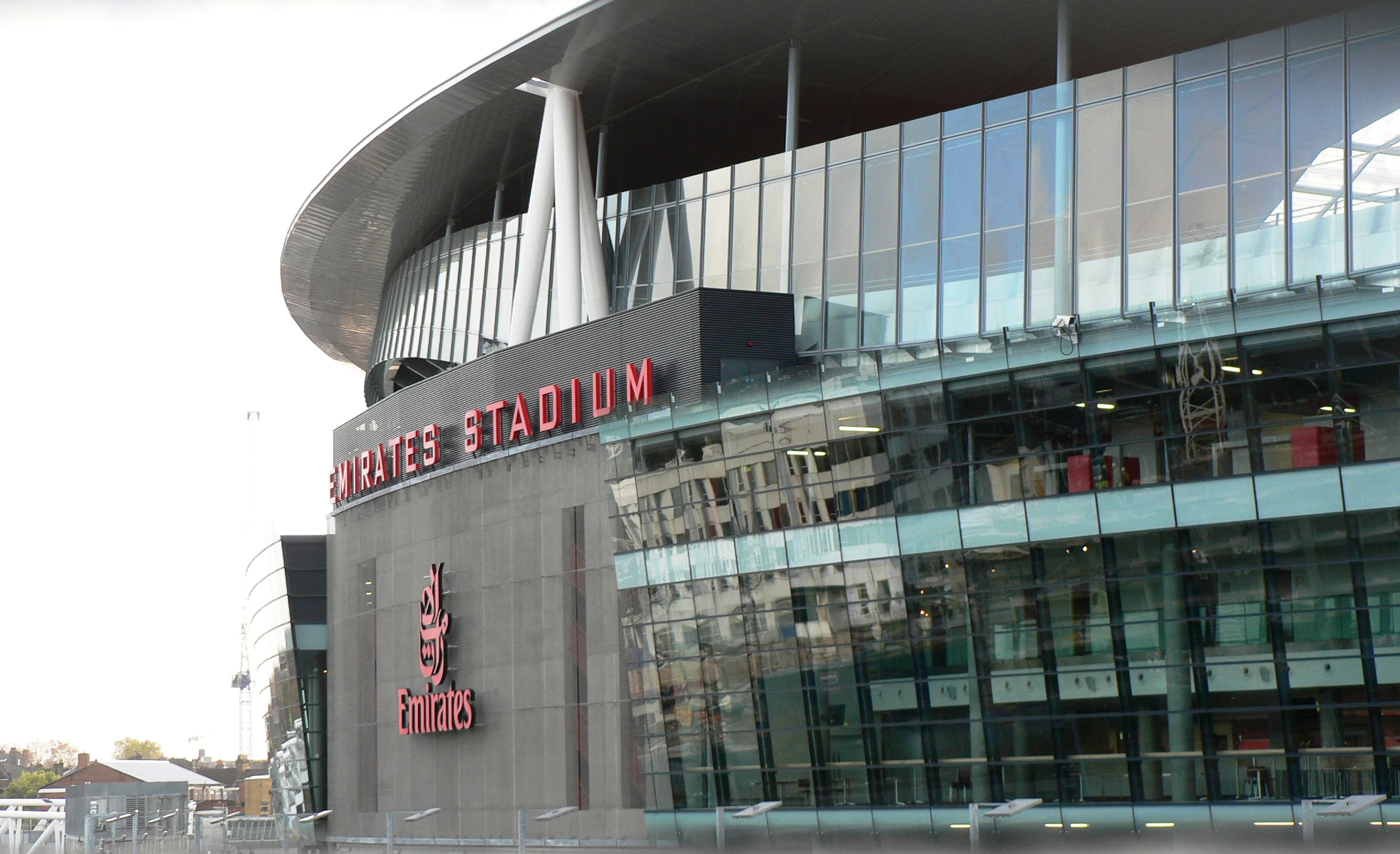 Vonkajšia strana Emirates Stadium